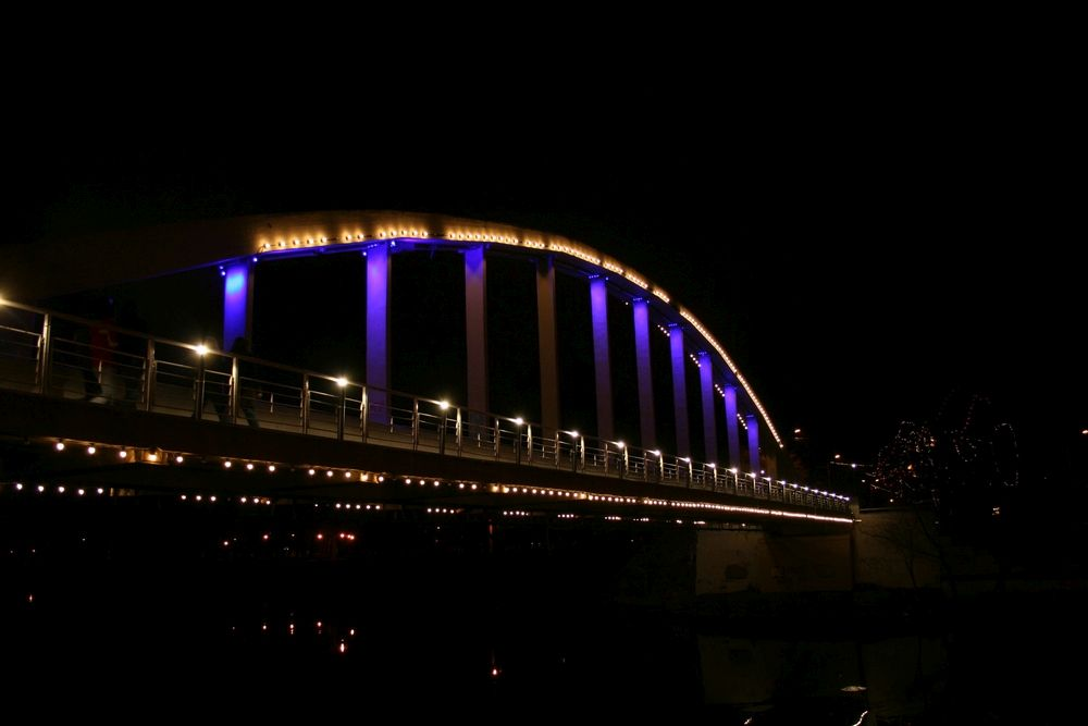 Välisvalgustus Tartus Kaarsillal, 2007